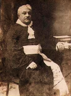 pessoa togada